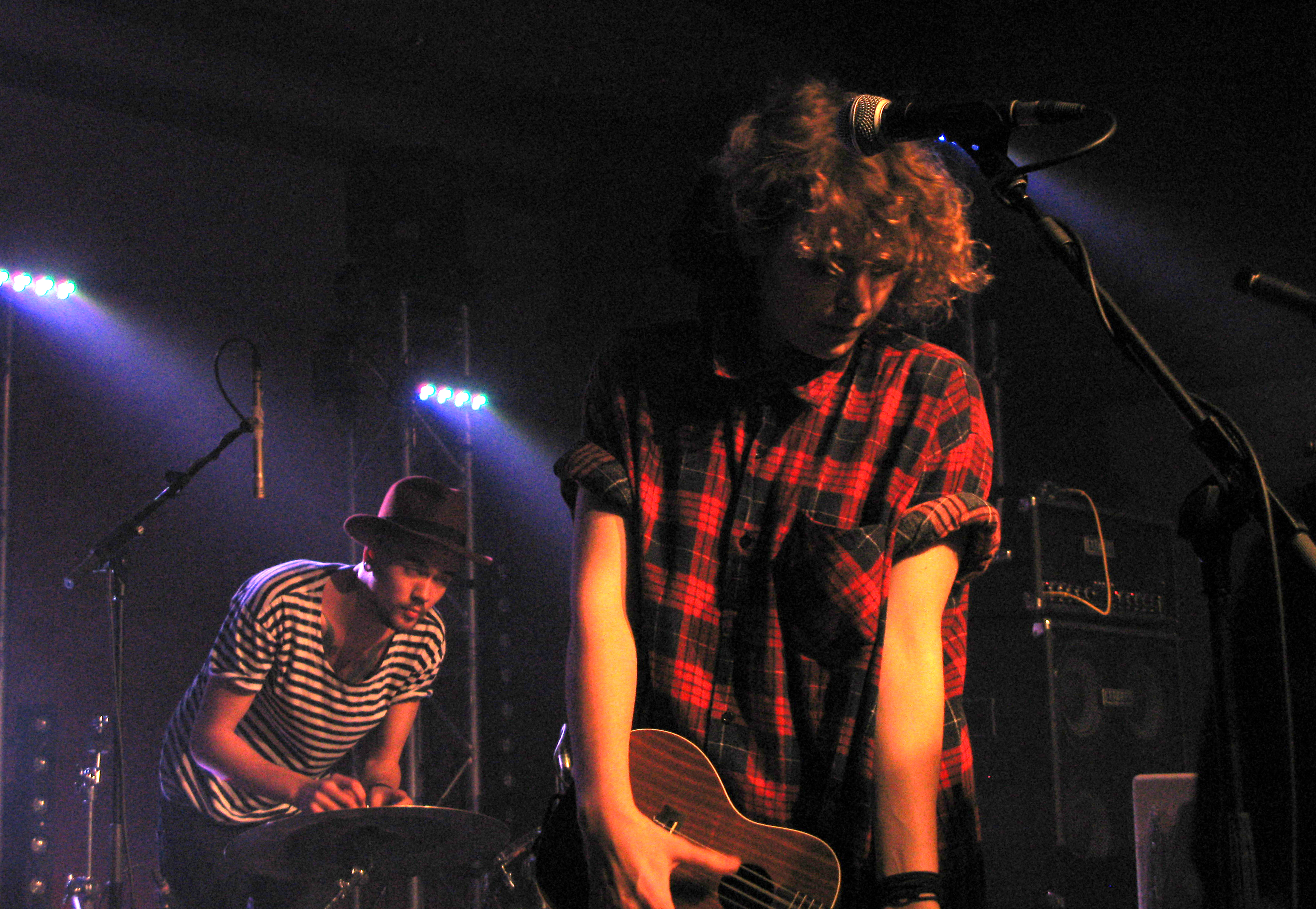 Amiens (Somme, France) - 5ème édition de la "Nuit Blanche". Série de 7 concerts "Brighton live", au Carré de la République. Après Rayon Breed et sa violoncelliste Abi Wade-Gledhill, puis successivement Emily Baker et Darius Alexander, ... le groupe Peggy Sue occupe la scène pour le quatrième concert. Les musiciens installent et accordent leurs instruments. .